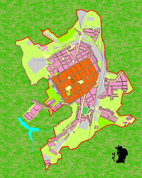 КАРТА ДАНИЛОВА (авторская работа Колоскова Николая)